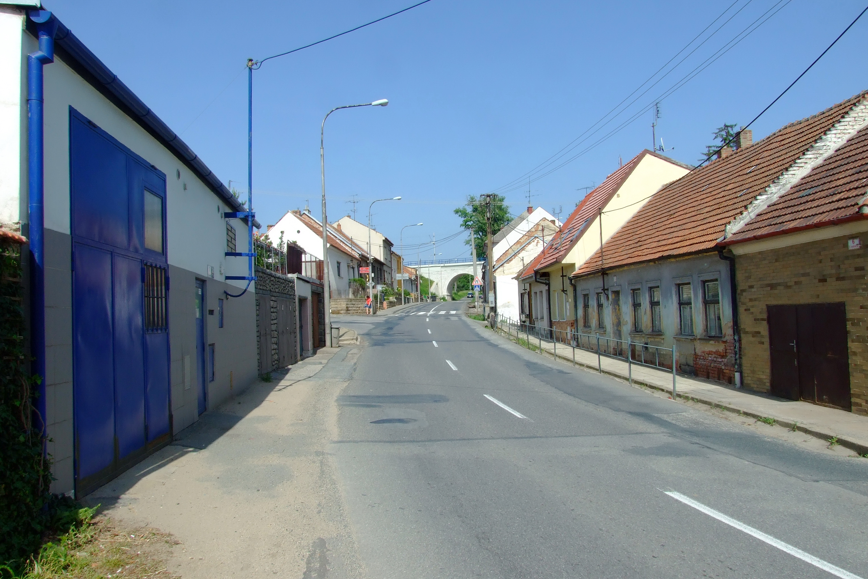 Brno-Chrlice - ulice U Viaduktu v bývalé obci Růžový